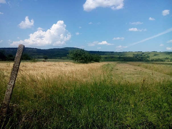 Околиці села Ляхівці зі сторони смт.Середнє